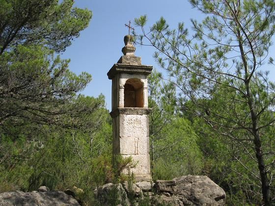 Piló de Terme de Sucaina (Alt Millars, Castelló)